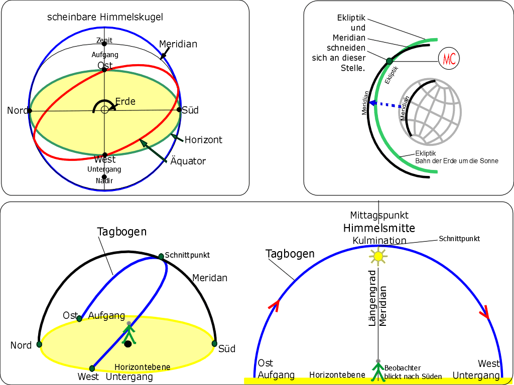 MC, Medium coeli (Astrologie). grafische Darstellung, Himmelsmechanik